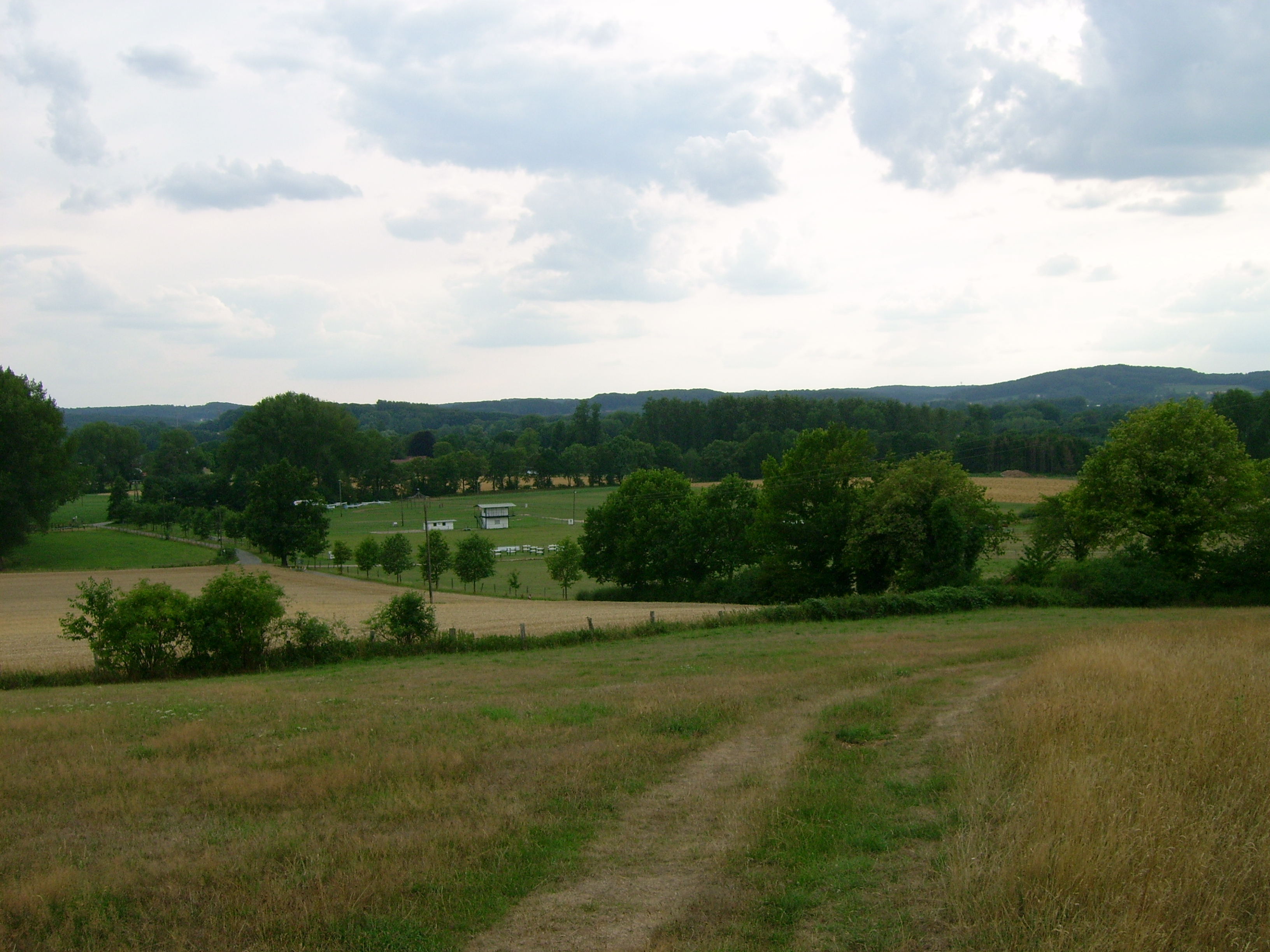 Blick vom Roten Berg in Hasbergen nach Südwesten